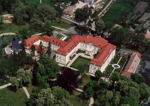 Röjtökmuzsaj, Hungary, aerialphotography